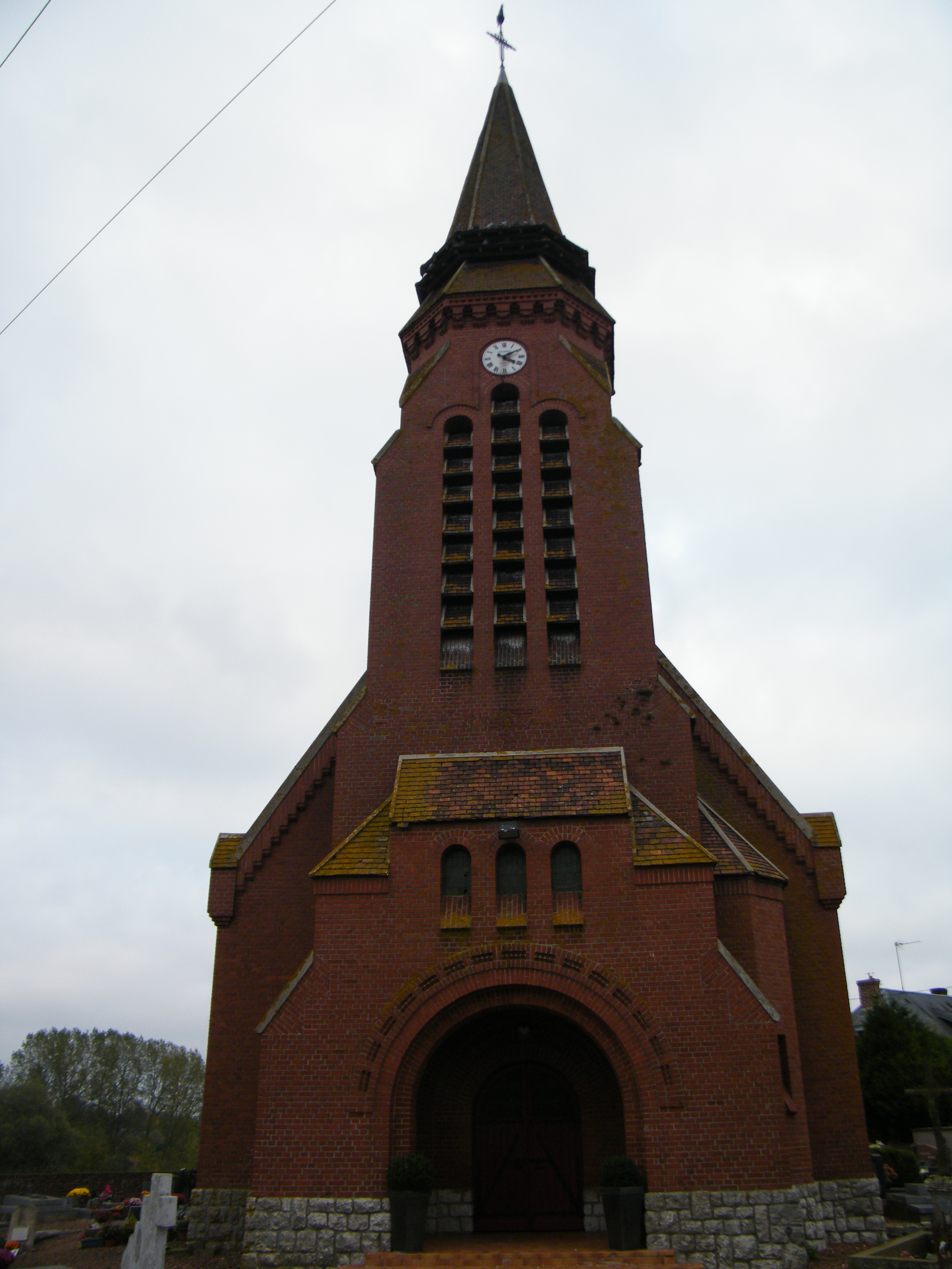 église.